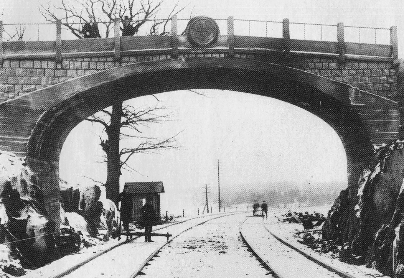 Götalandsvägsviadukten